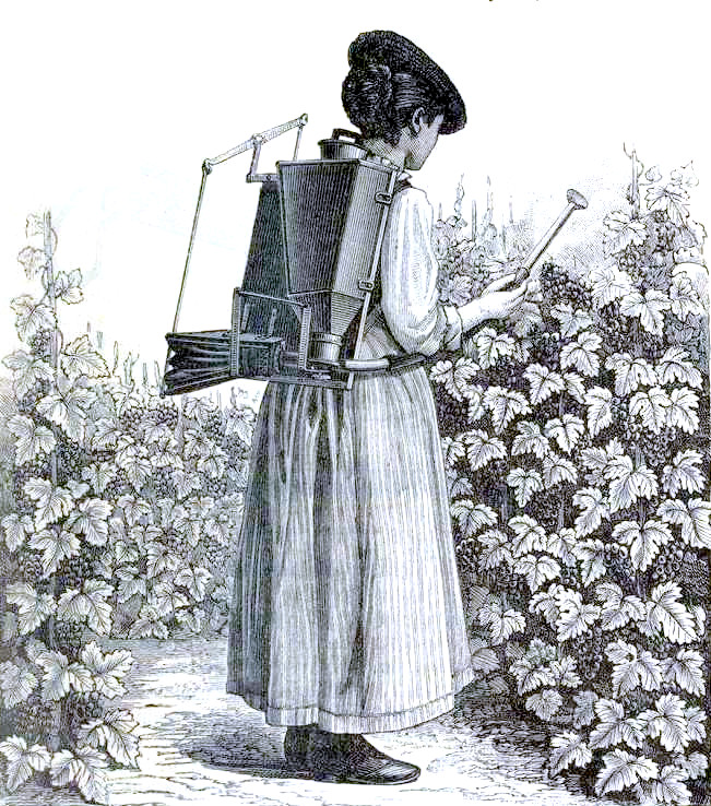 Soufreuse Phénix à grand travail, illustrant un article intitulé "Appareils pour le traitement des maladies cryptogamiques de la vigne" (1888)